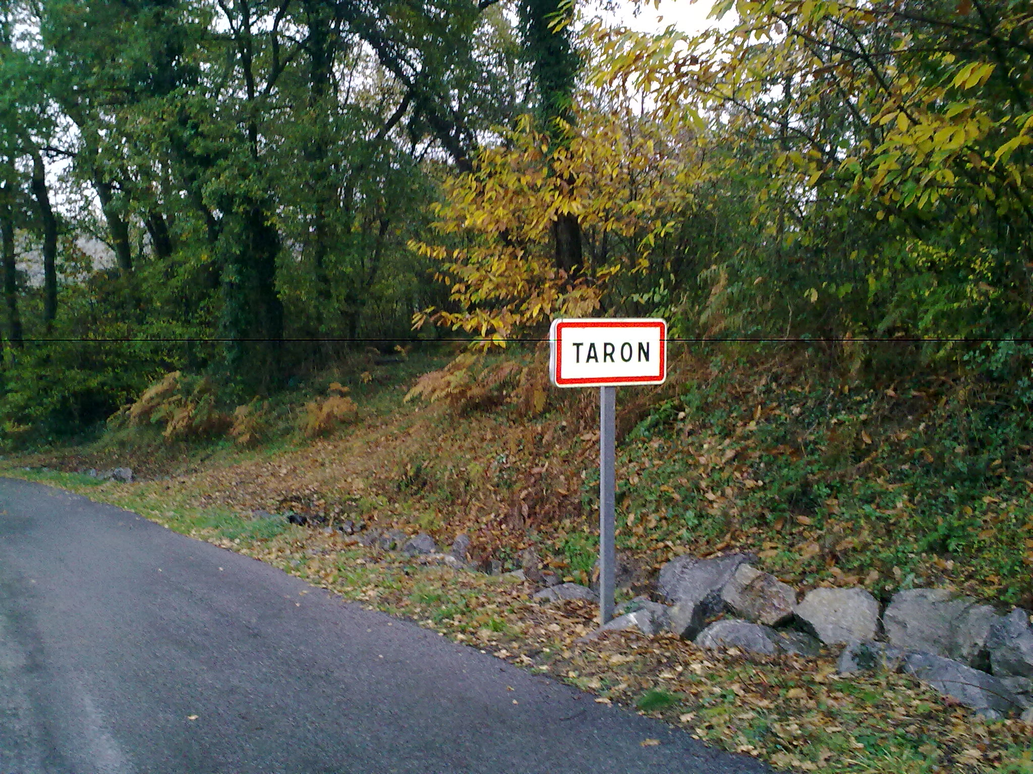 Taron-Sadirac-Viellenave, France.